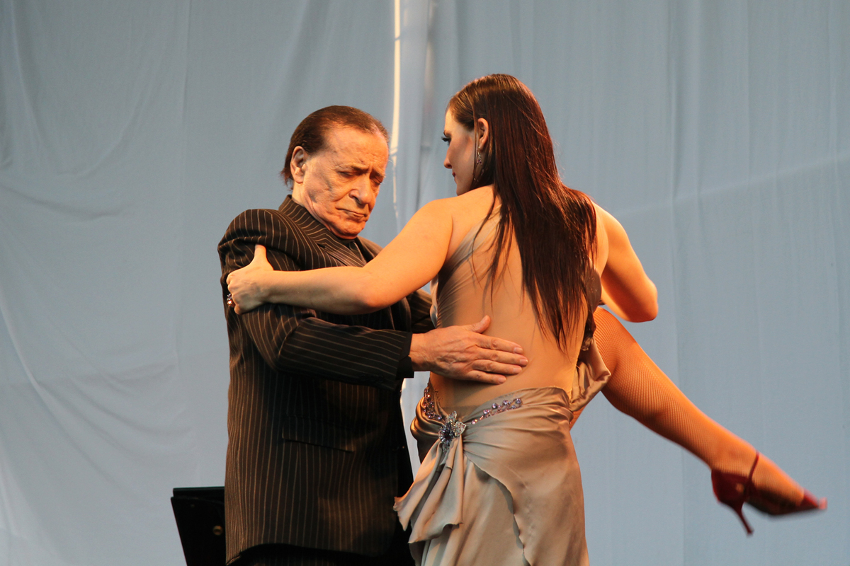 Juan Carlos y su hija Johanna Copes deleitaron al público con su buen baile. ( Foto: Estrella Herrera)